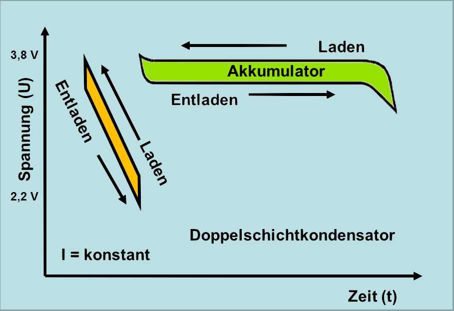 Vergleich der Lade- und Entladespannung zwischen Lithium-Ionen-Akkus und Lithium-Ionen-Kondensatoren